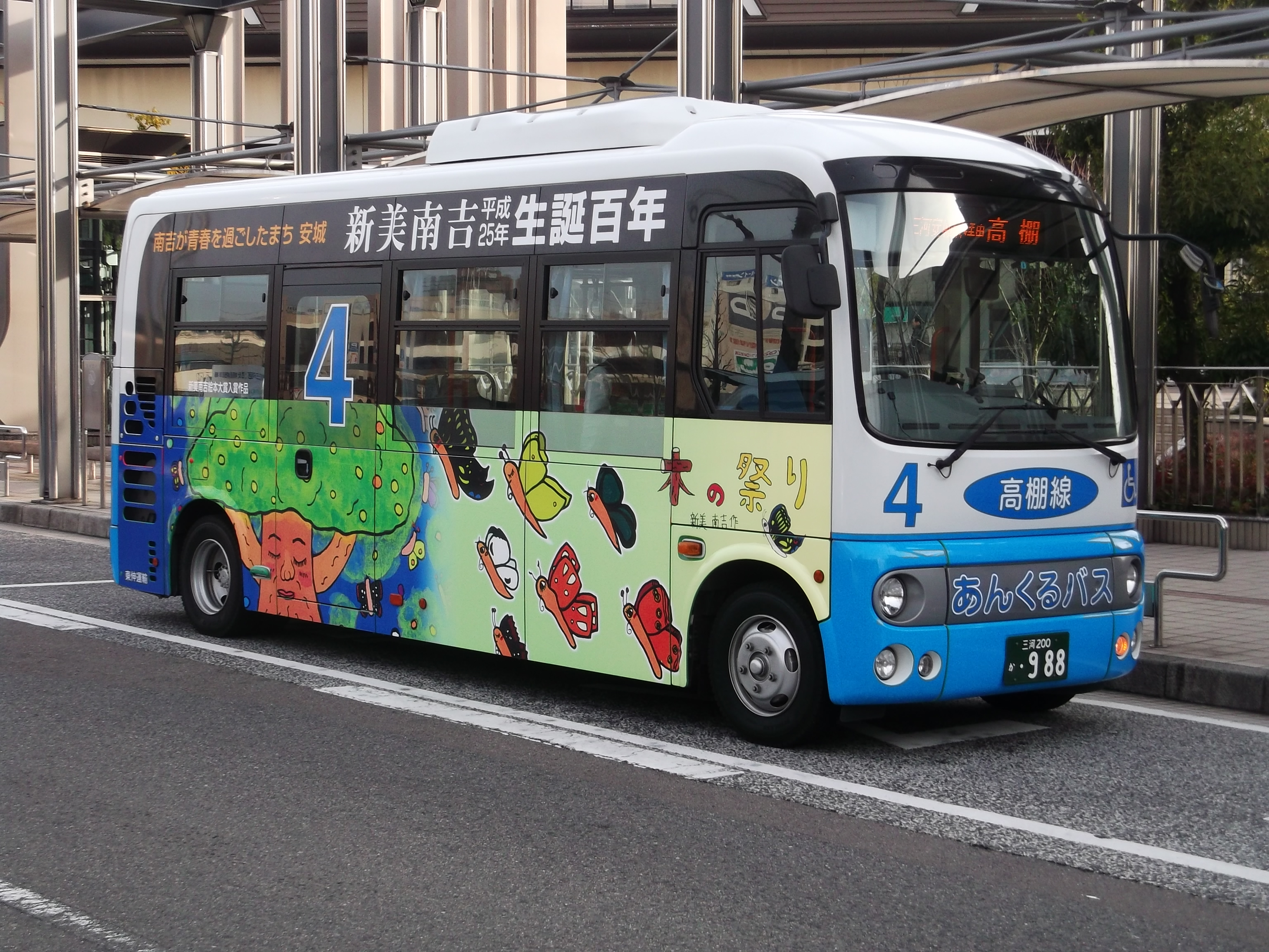 愛知県安城市の「あんくるバス」 4番系統 高棚線